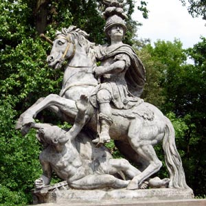 Monument in Lazienki Park